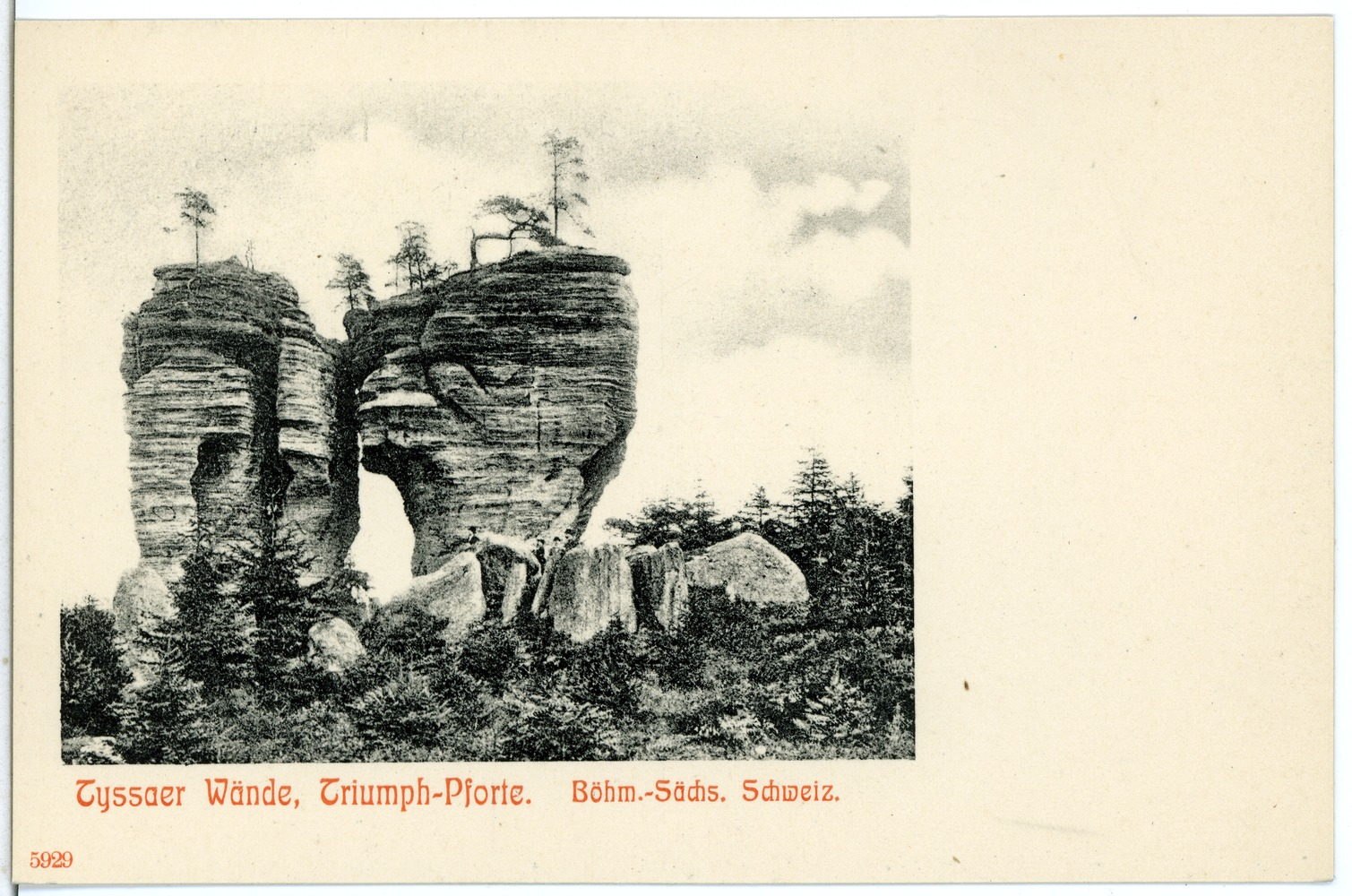 Tyssa; Tyssaer Wände - Triumph-Pforte Diese Ansichtskarte stammt vom Kunstverlag Brück & Sohn aus Meißen ( Die Karte hat die eindeutige Nummer 05929 und ist in höherer Auflösung beim Verlag erhältlich. Sie wurde im Rahmen einer Kooperation zwischen Wikipedianern und dem Kunstverlag für Wikimedia Commons zur Verfügung gestellt.